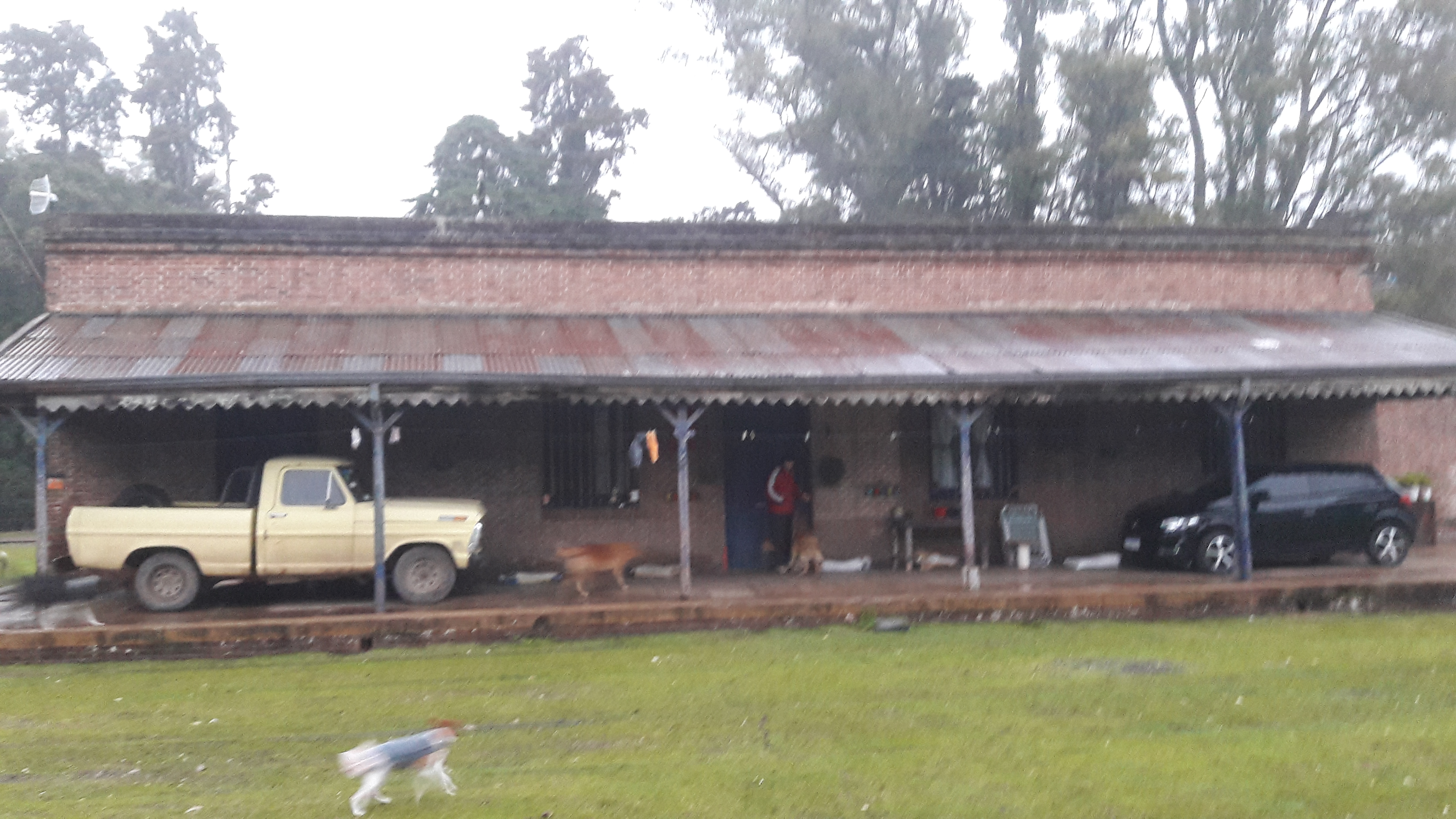 Vista de la estación